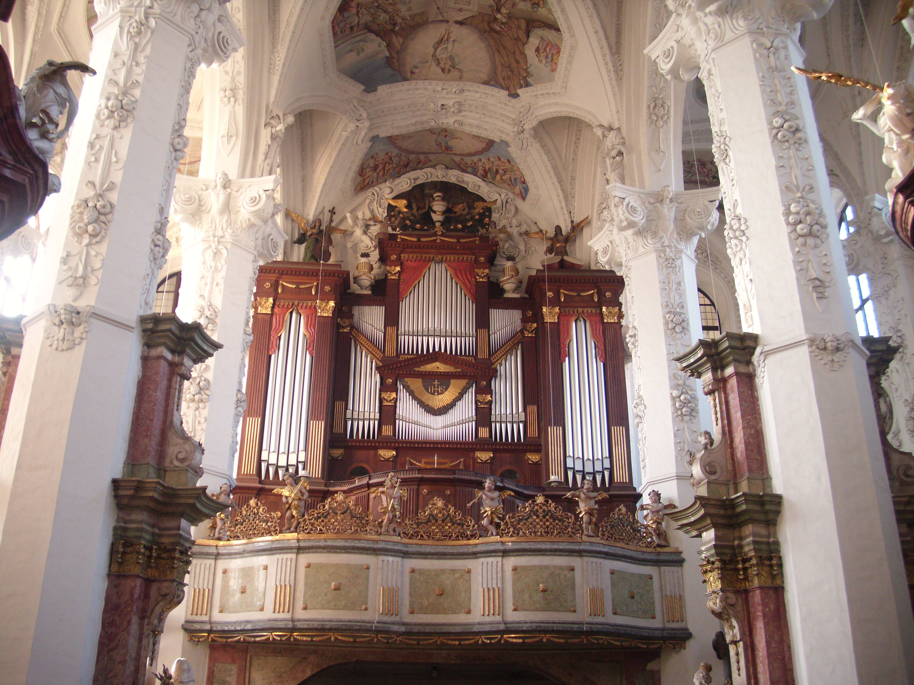 Wilhelm Sauer Orgel (op. 981), St. Marien Kirche, Kloster Neuzelle, Naturpark Schlaubetal Brandenburg